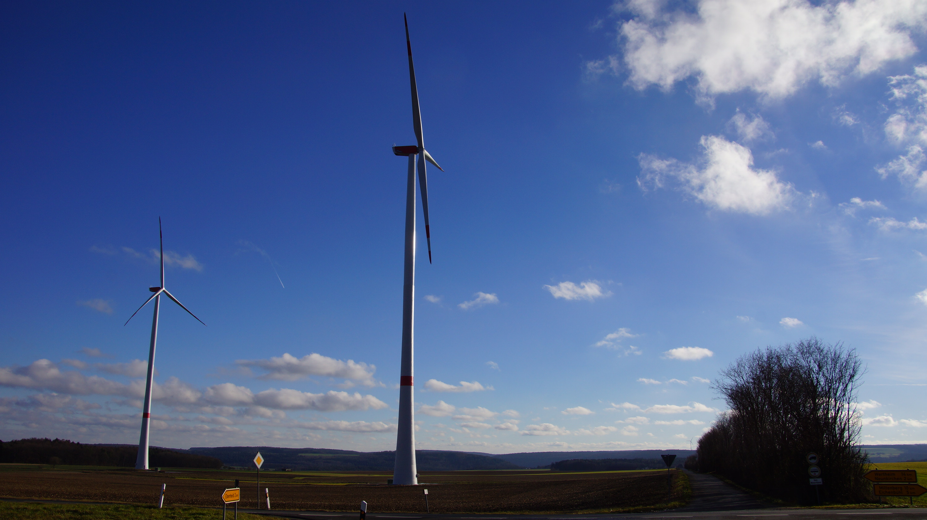 Windpark in Neunkirchen (Unterfranken) bei Miltenberg